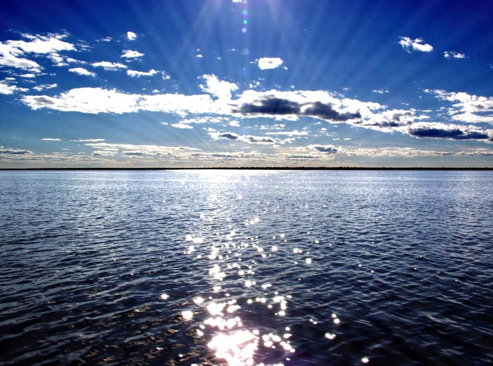 река Котуй